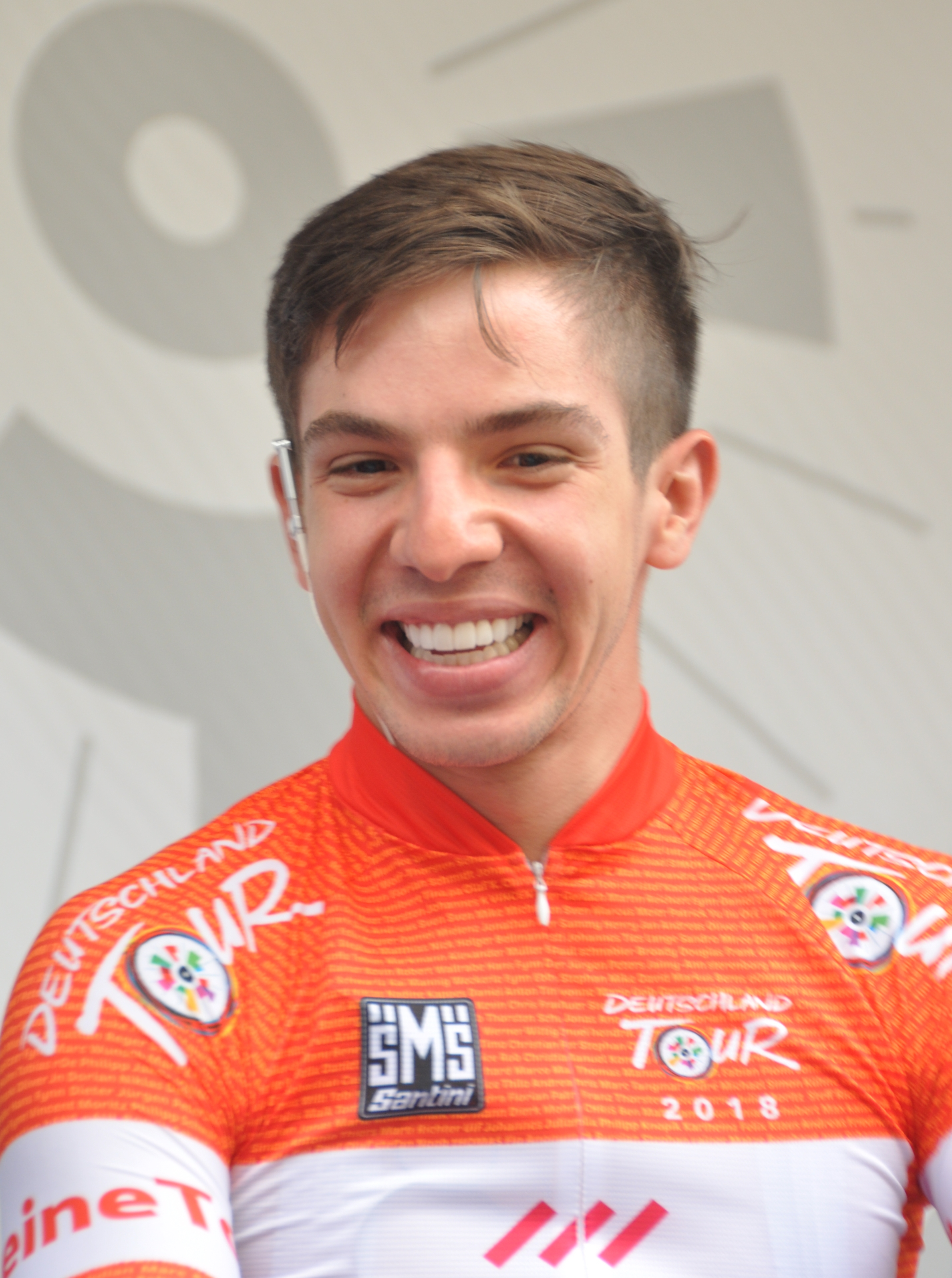 Álvaro Hodeg, kolumbianischer Radrennfahrer